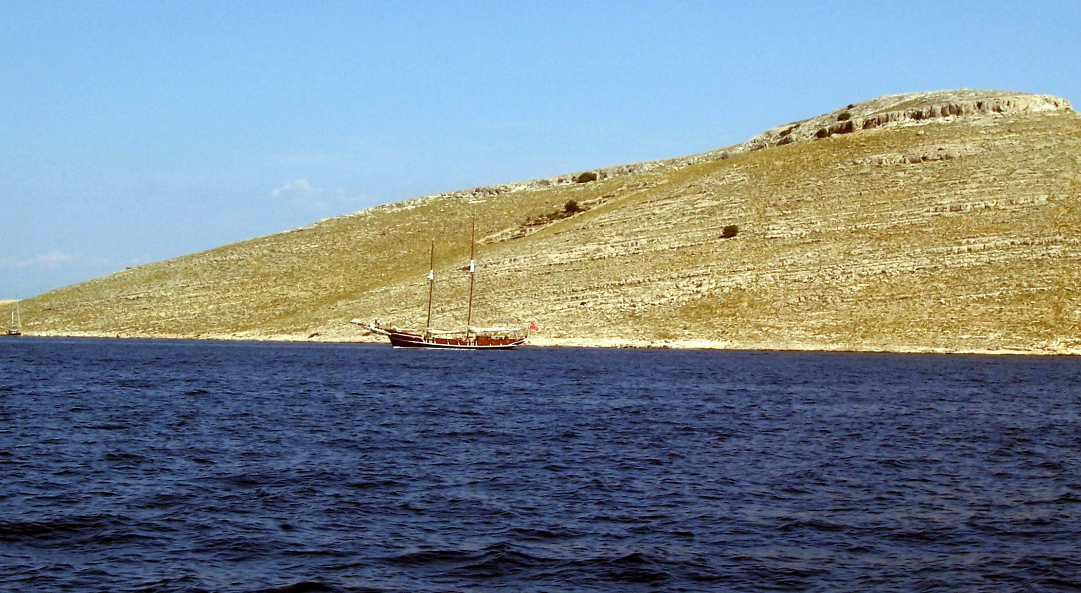 en.: View at Kornati, Croatia. dt. Blick auf ein Kornaten-Eiland, Kroatien.